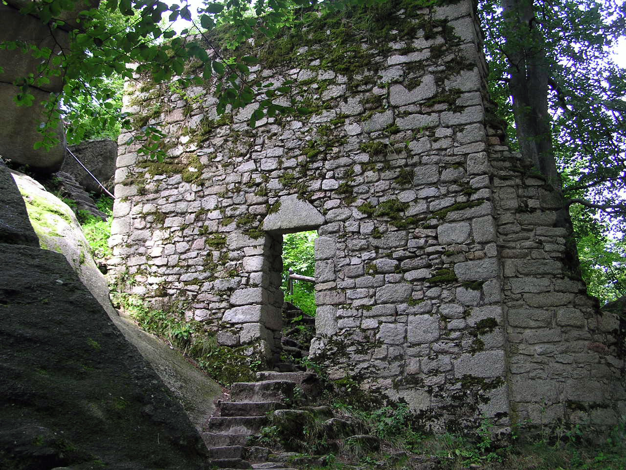 Description: Großer Waldstein, Kapellenruine Source: selbst fotografiert Date: 19. August 2005 Author: Schubbay